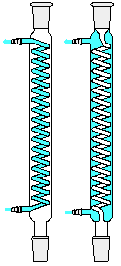 Graham condensers